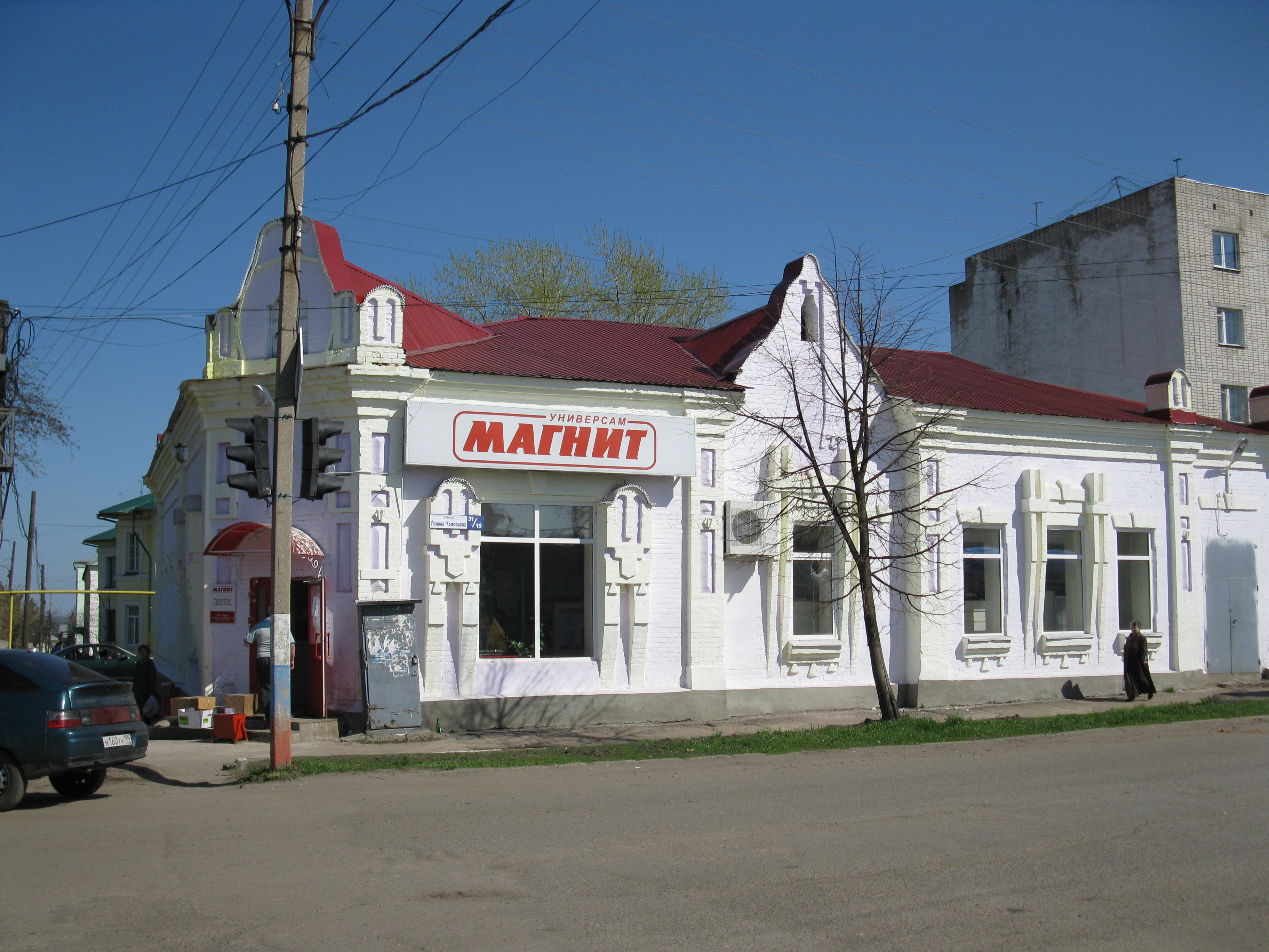 Бывший кинотеатр "АРС"